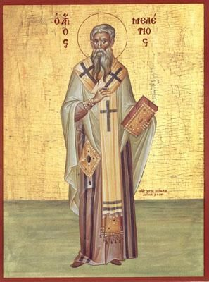 Ікона Мелетія Антіохійського